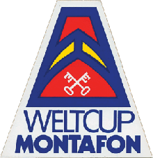 Logo des Goldschlüsselrennens